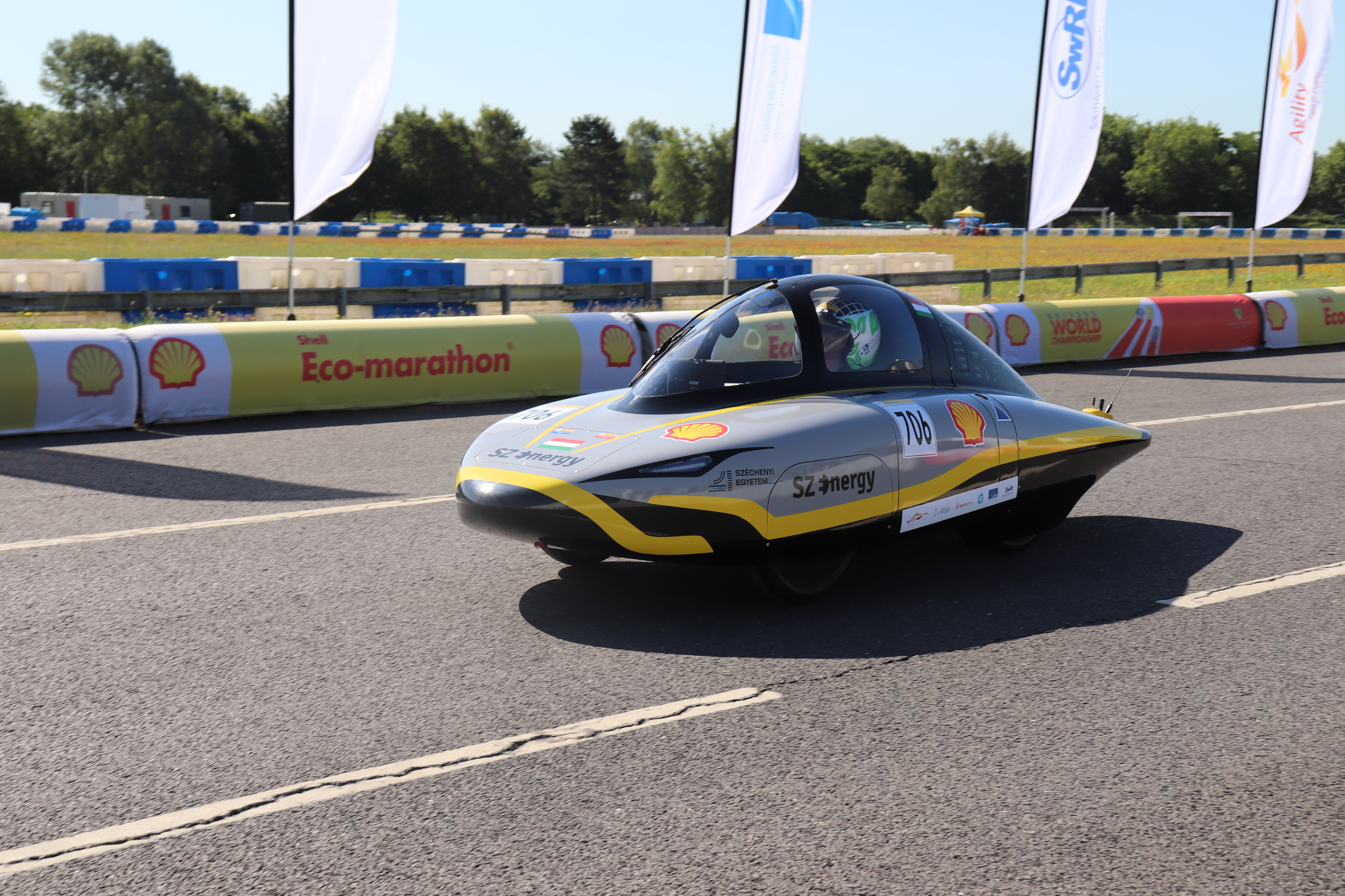 Verseny közben a 2019-es versenyautó a Mercedes-Benz World versenypályán Londonban.